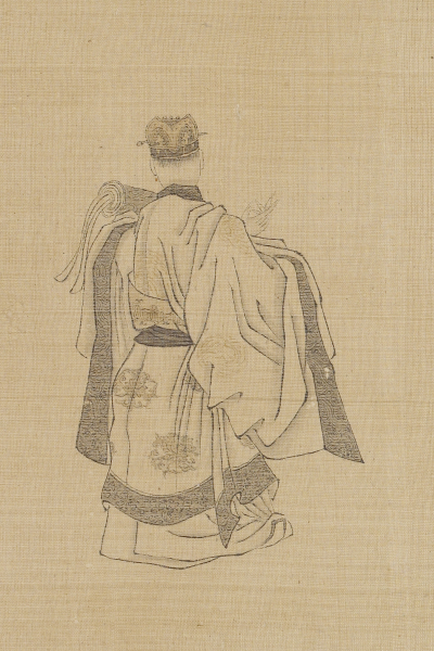 Du Ruhui